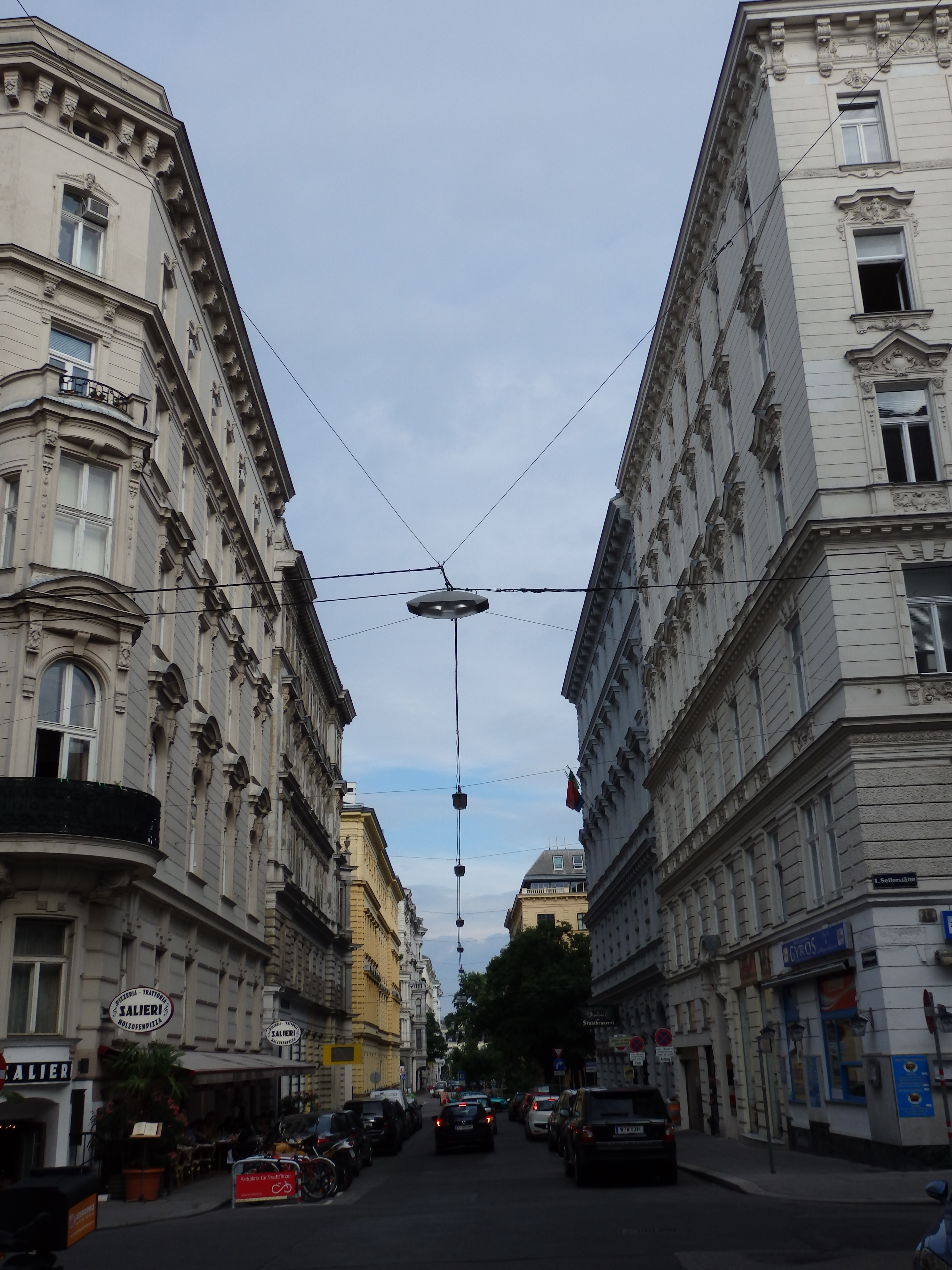 Fichtegasse, von der Seilerstätte aus gesehen, Wien-Innere Stadt